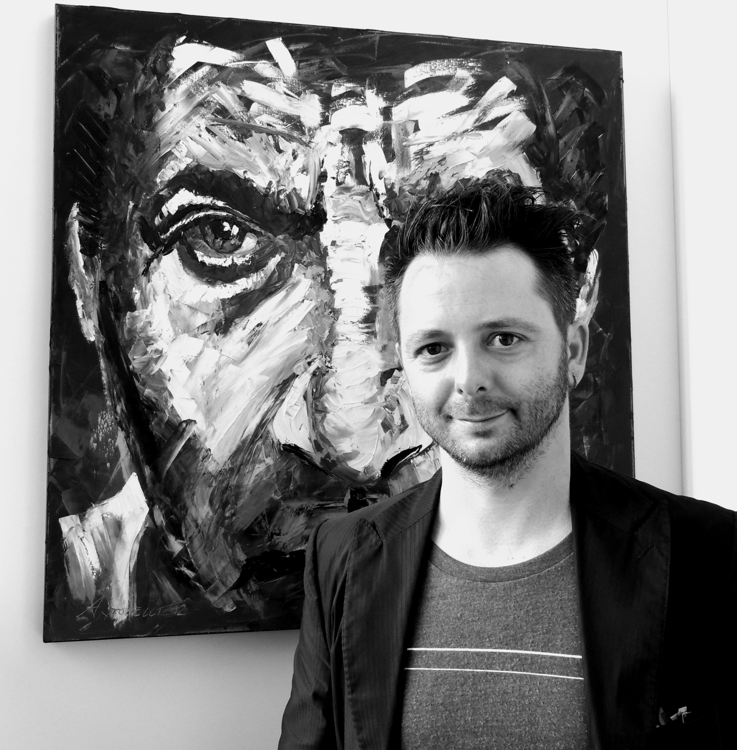 Riccardo Antonelli alla Triennale di Roma 2015